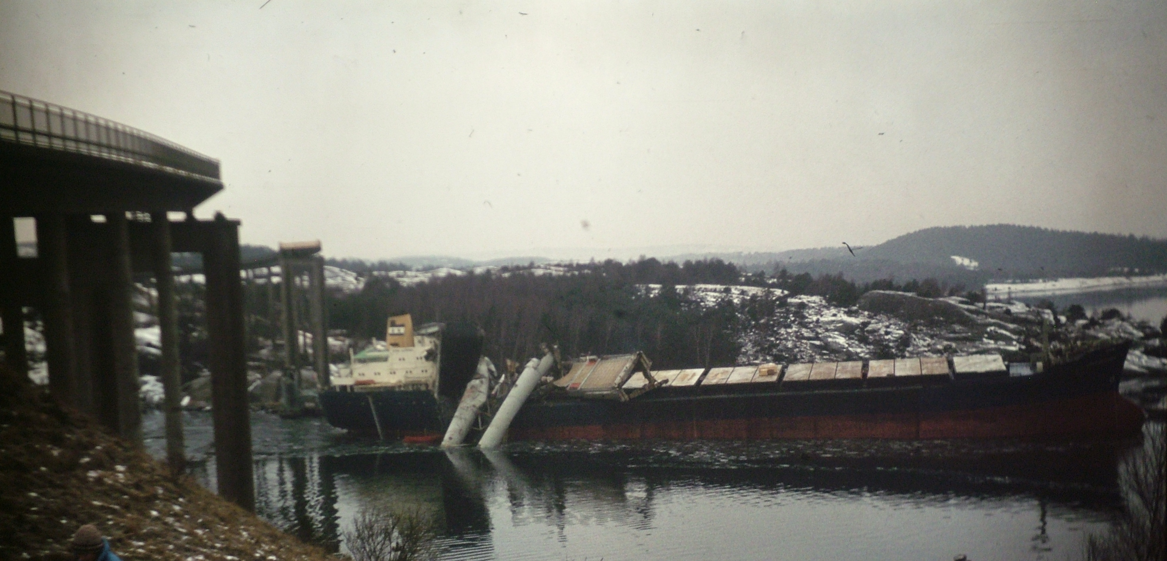 Fotat i från Källön / Stenungsund-sidan